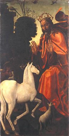 A Criação dos Animais é um dos painéis que constitui o Políptico da Capela-mor da Sé de Lamego, tendo sido criado, por Grão Vasco tal como as outras componentes deste Políptico, no período entre 1506 e 1511. Tendo de altura 174 cm e de largura 92 cm, a obra representa o episódio bíblico da Criação dos Animais